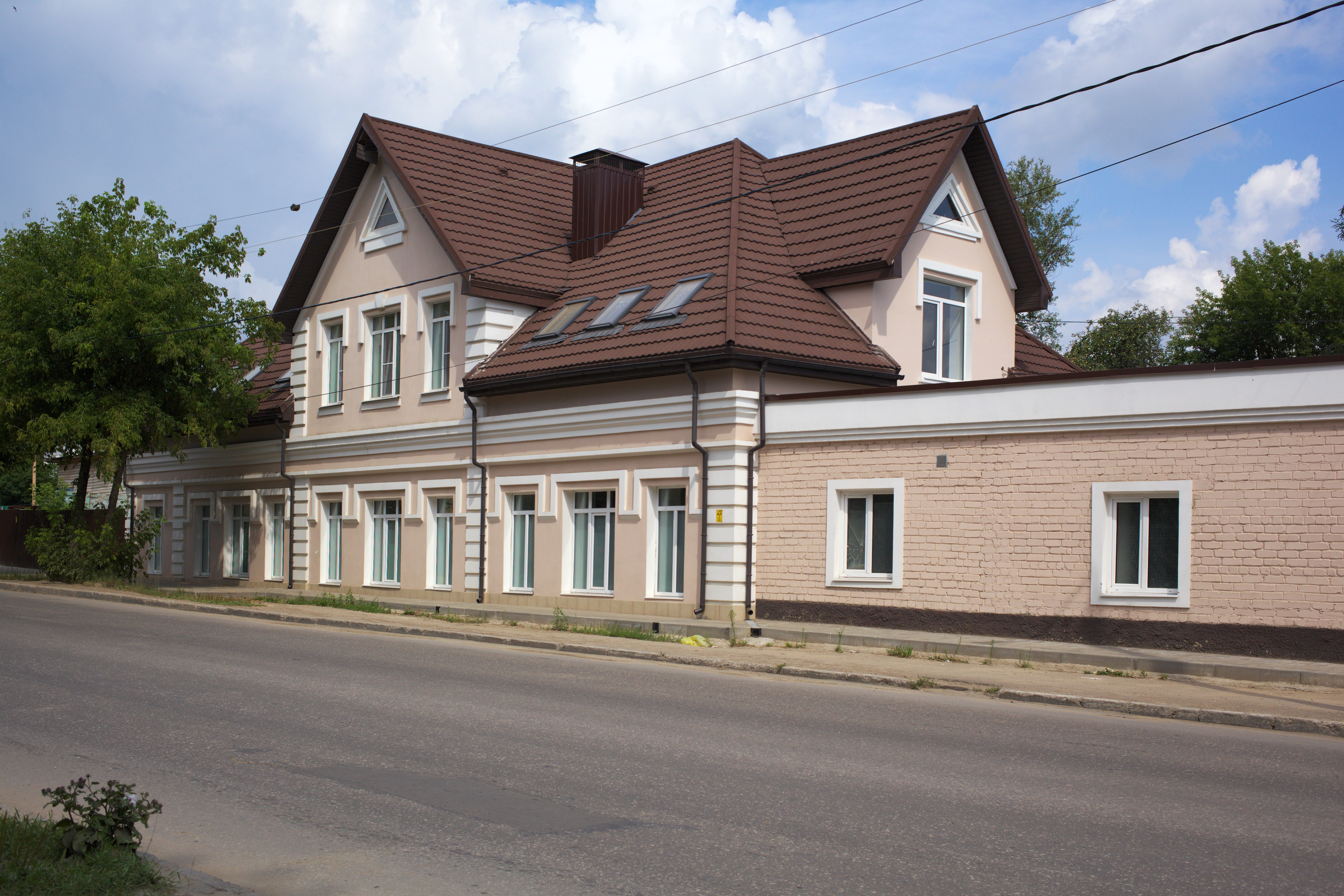 Калуга, остатки Крестовоздвиженского монастыря. Бывшая пекарня, переделанная в церковь